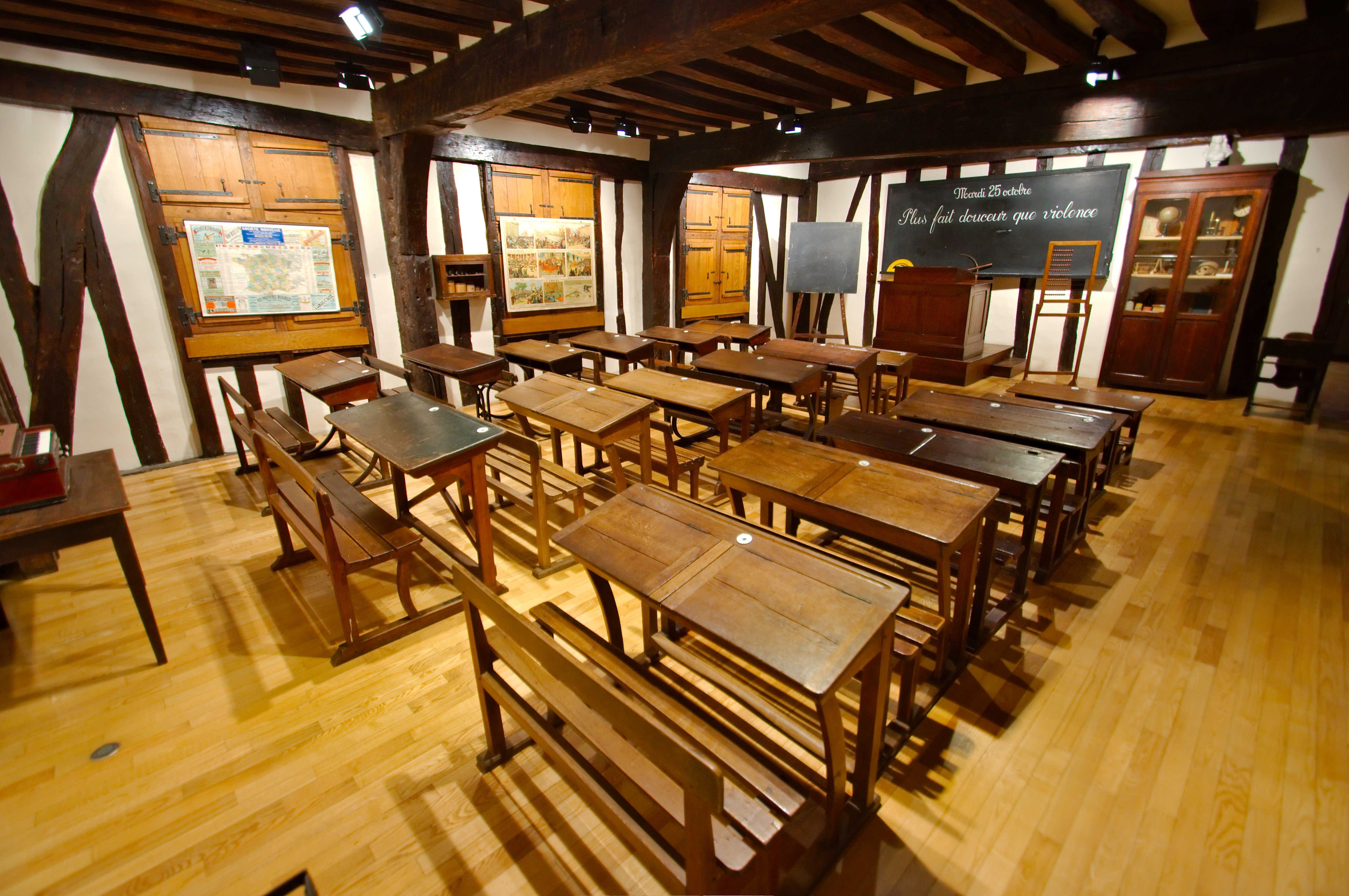 Reconstitution d’une salle de classe au Musée National de l’Éducation, rue Eau-de-Robec à Rouen